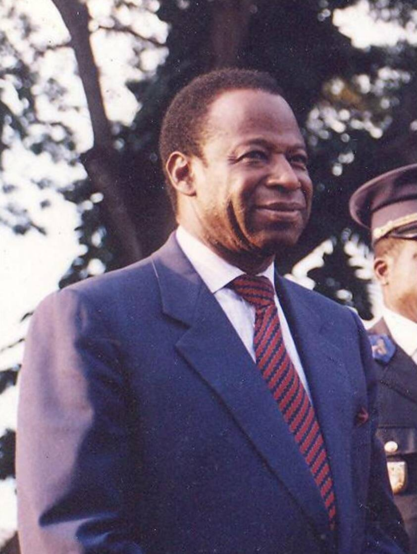 Essy Amara, diplomate ivoirien